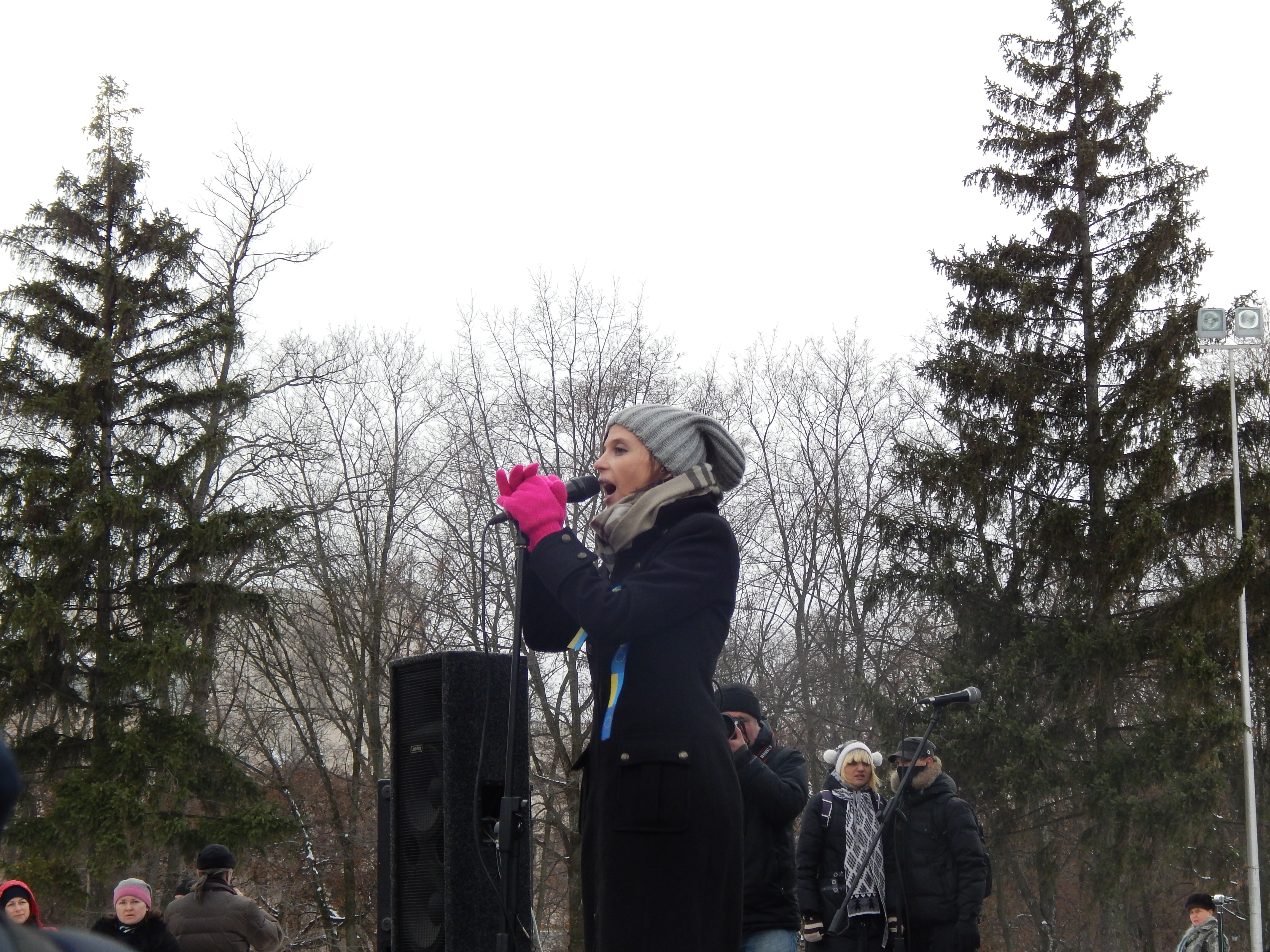 Євромайдан: Рок за зміни. Ірена Карпа виступає на мітингу у Харкові.